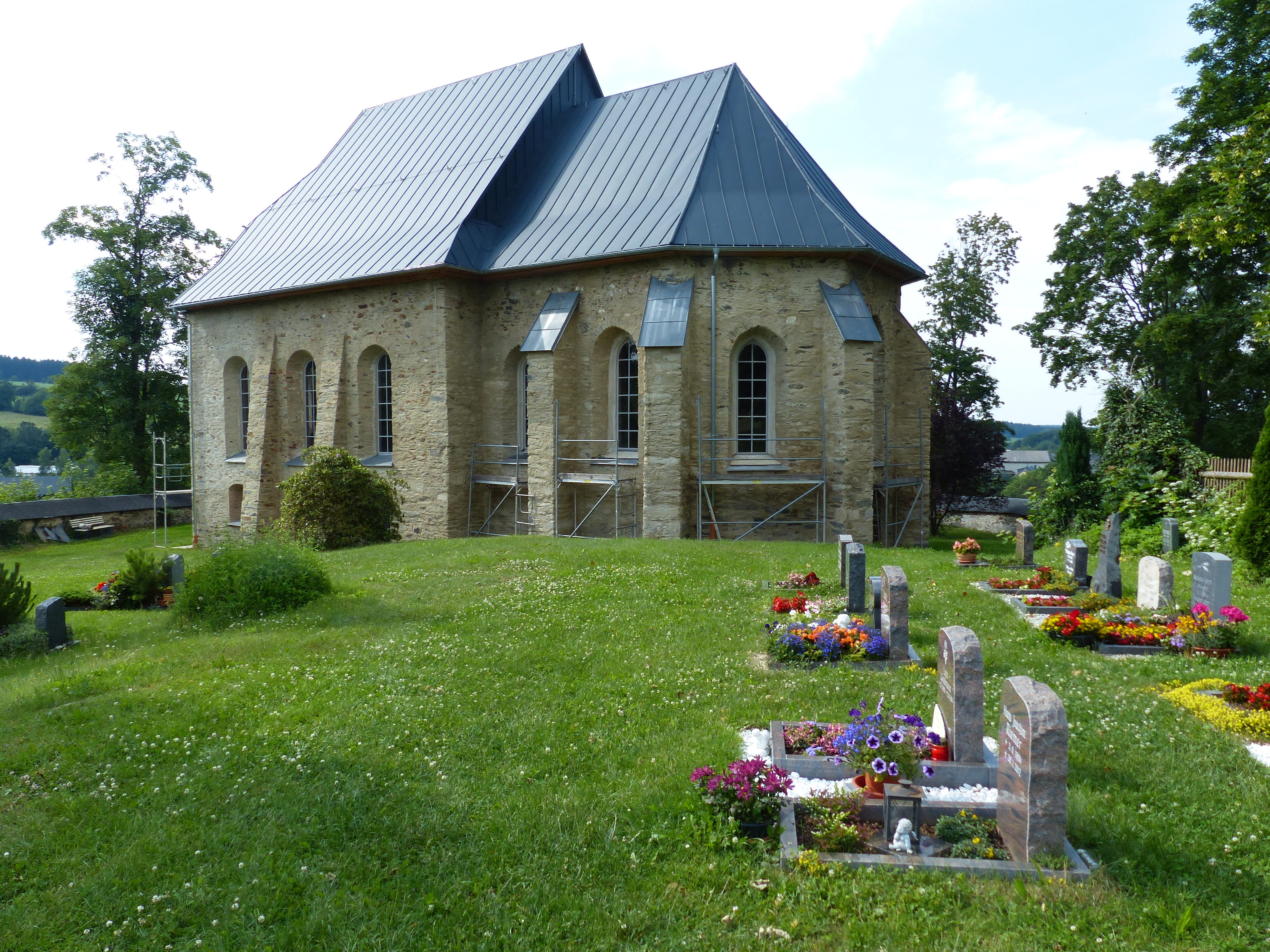 Bilderserie: Ansichten der Wehrkirche Triebel